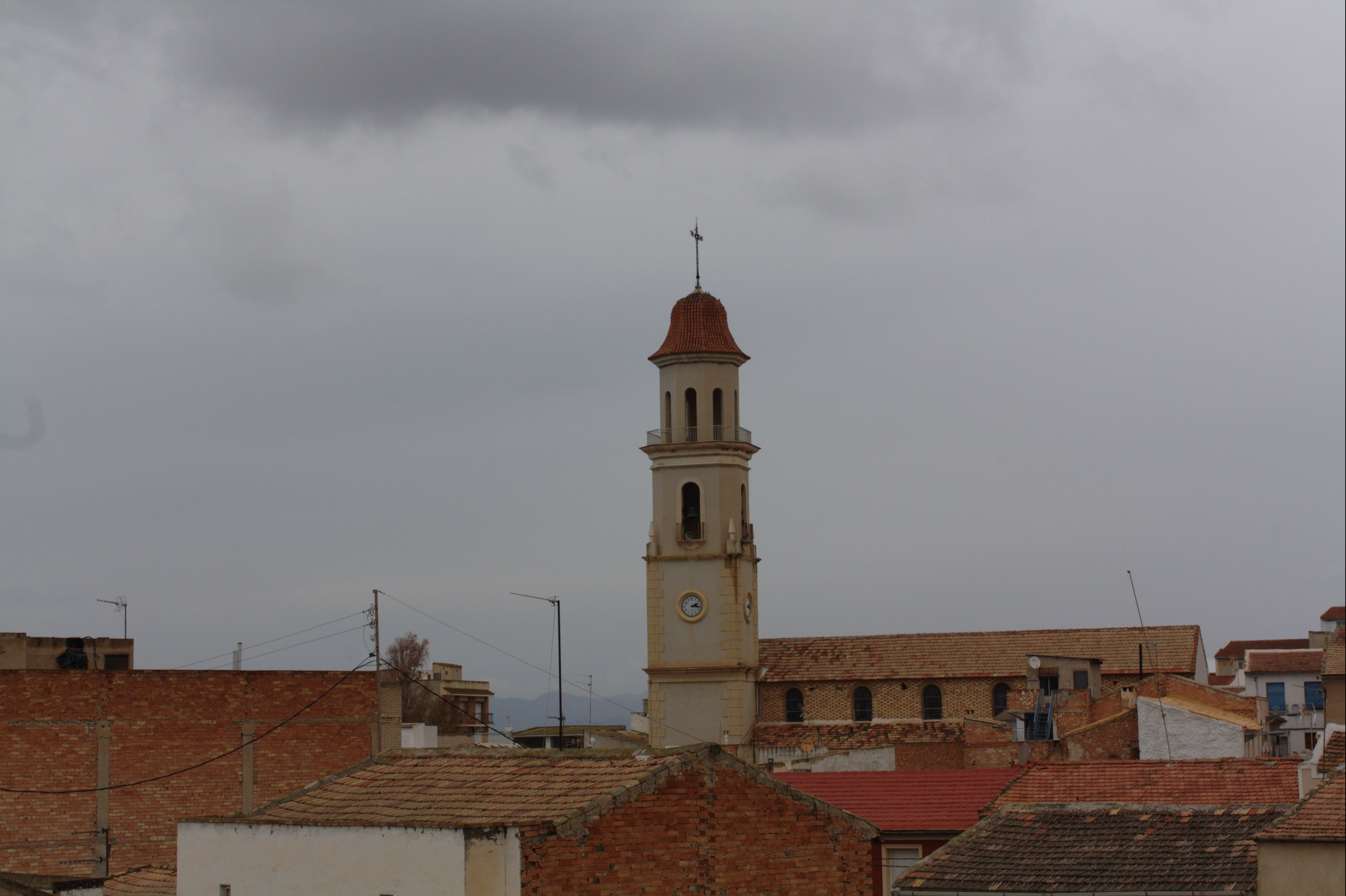 Iglesia Sagrado Corazón de la Ribera de Molina